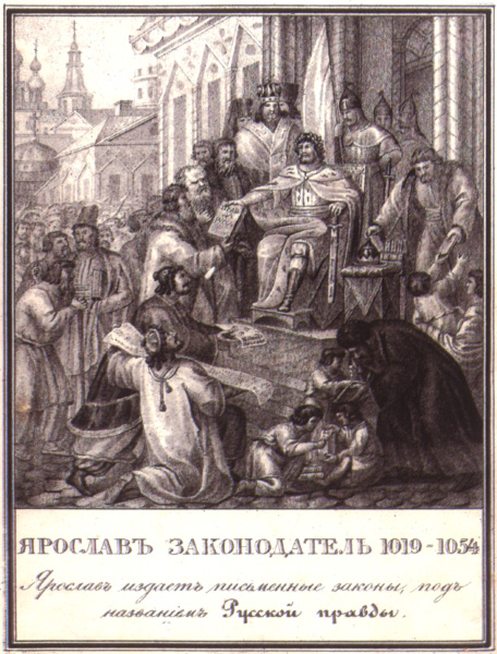 Ярослав Законодатель, 1036 – 1054.Литография